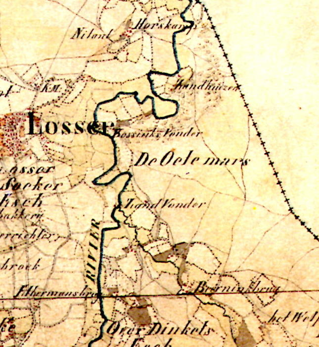 kaart oelemars uit 1835